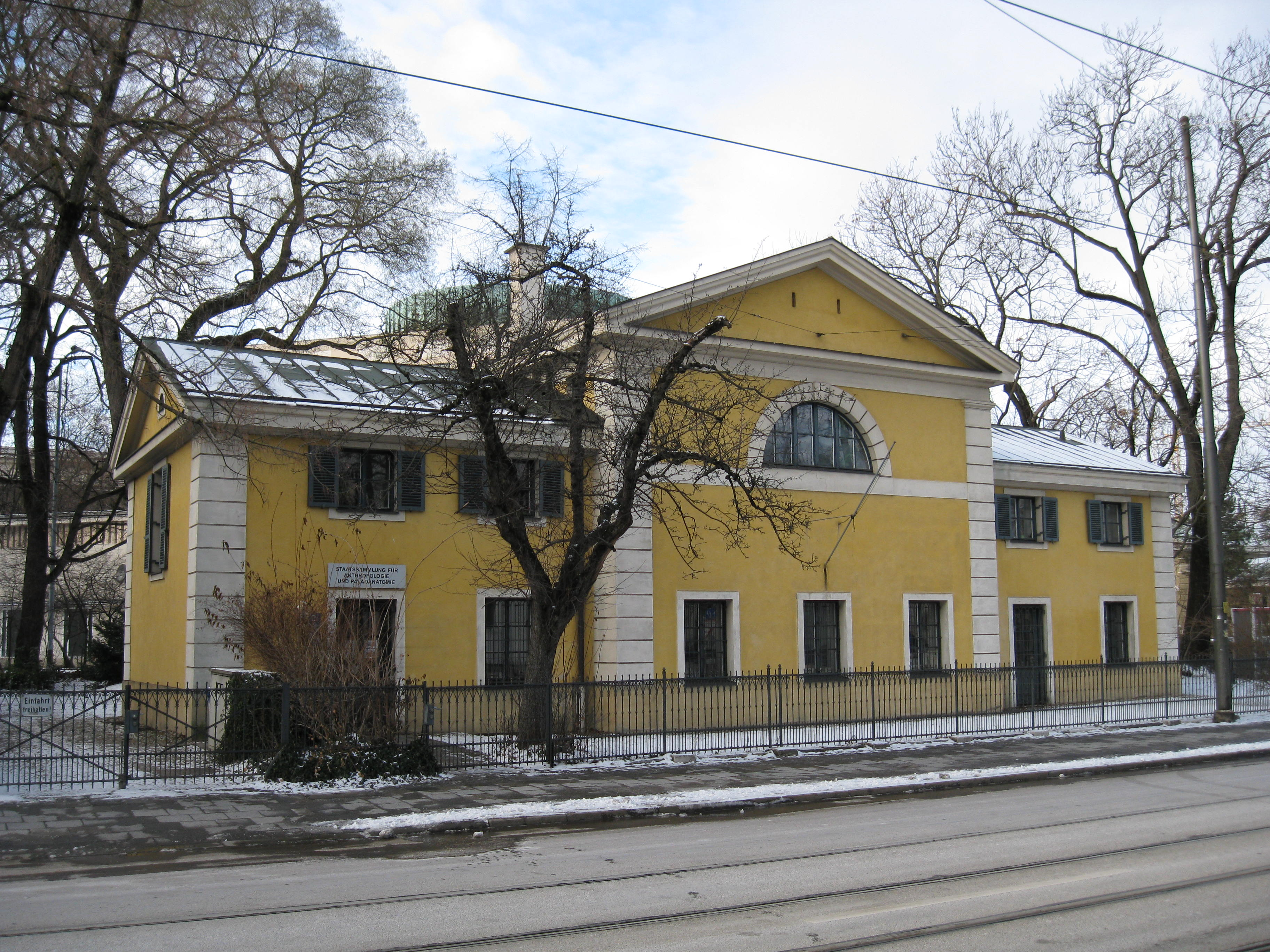 Gebäude der Anthropologischen Staatssammlung, München, am Karolienplatz